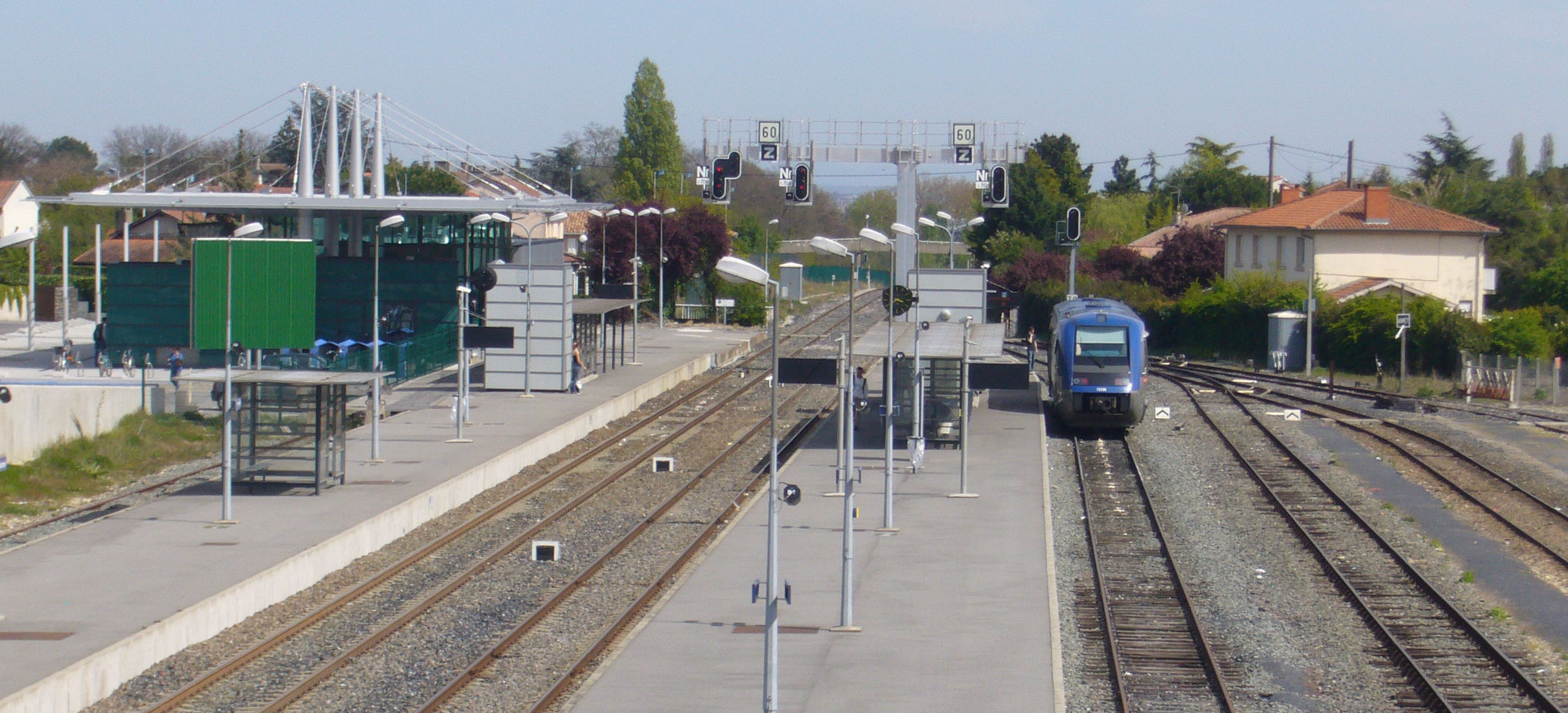 Colomiers (Haute-Garonne, France) : La gare.